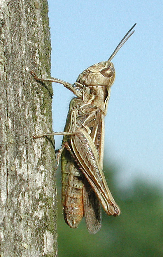 Chorthippus biguttulus, female, NSG Kirchwerder Wiesen, Elbmarsch bei Hamburg, Germany